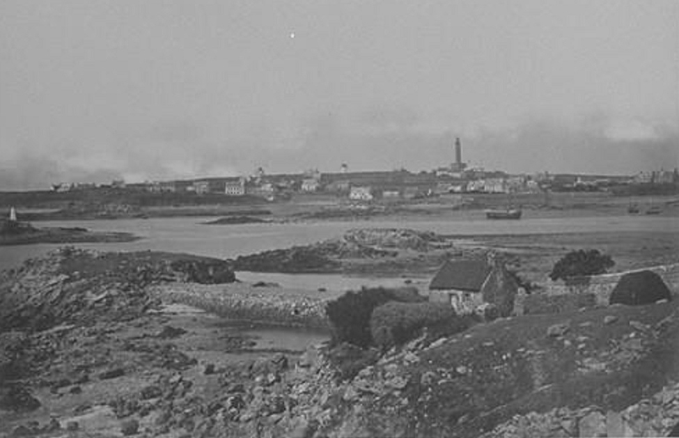 Île de Batz : l'Île de batz en 1873 (photo de J. Duclos